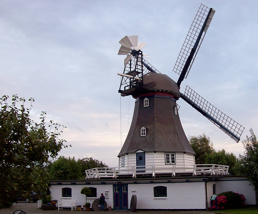 Friedrichskoog (Germany) Hochzeitsmühle